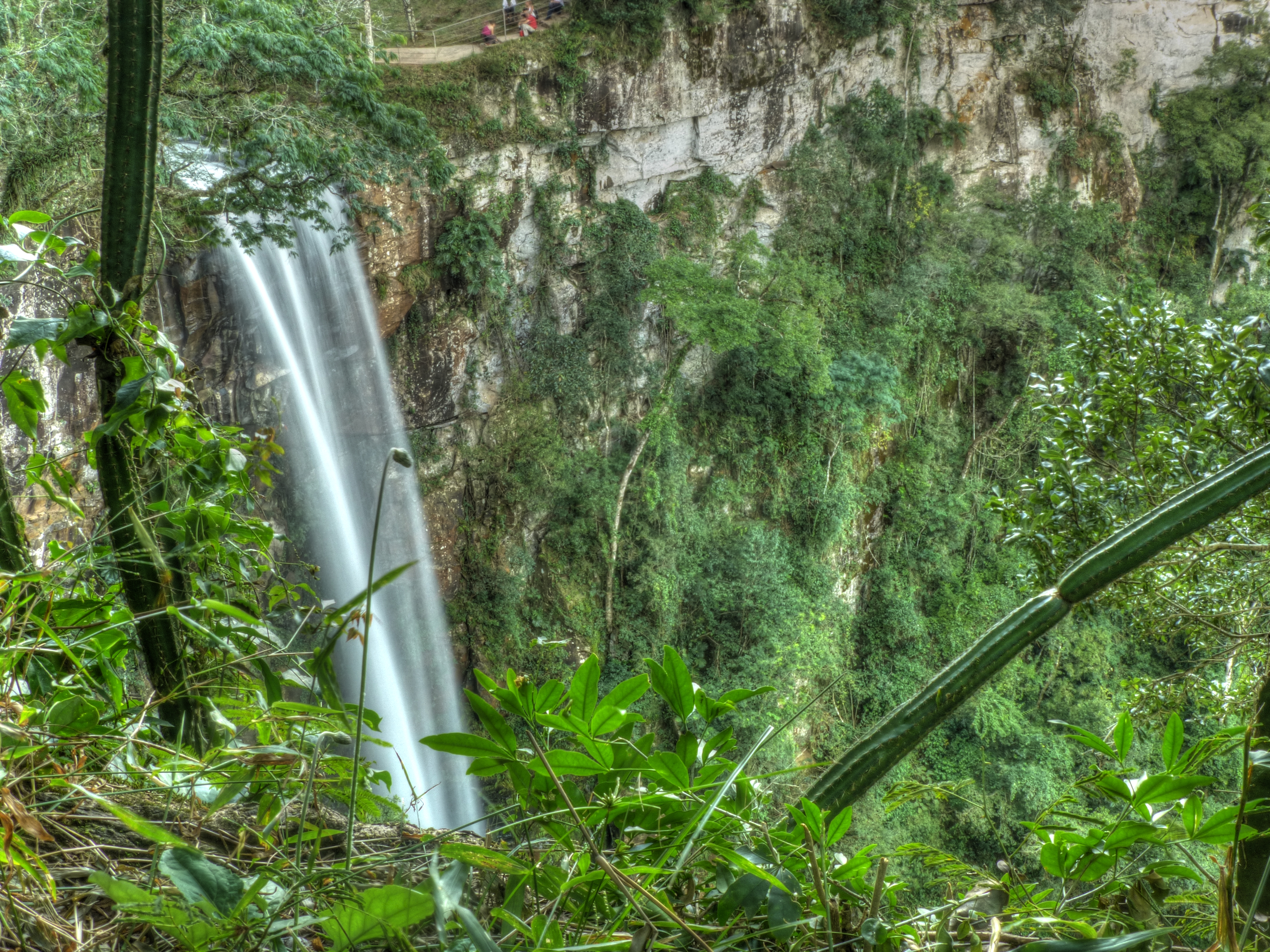 Salto Encantado, en la localidad de Aristóbulo del Valle, Misiones, Argentina.